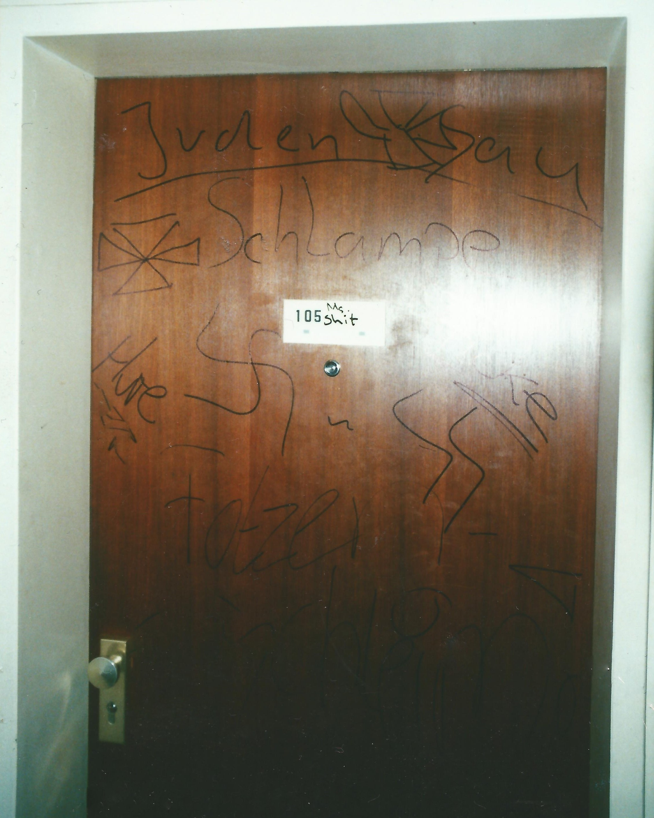 Antisemitische und sexistische Schmiererei ("Judensau", SS-Runen, Hakenkreuz etc.) an der Wohnungstür einer nichtjüdischen alten Frau